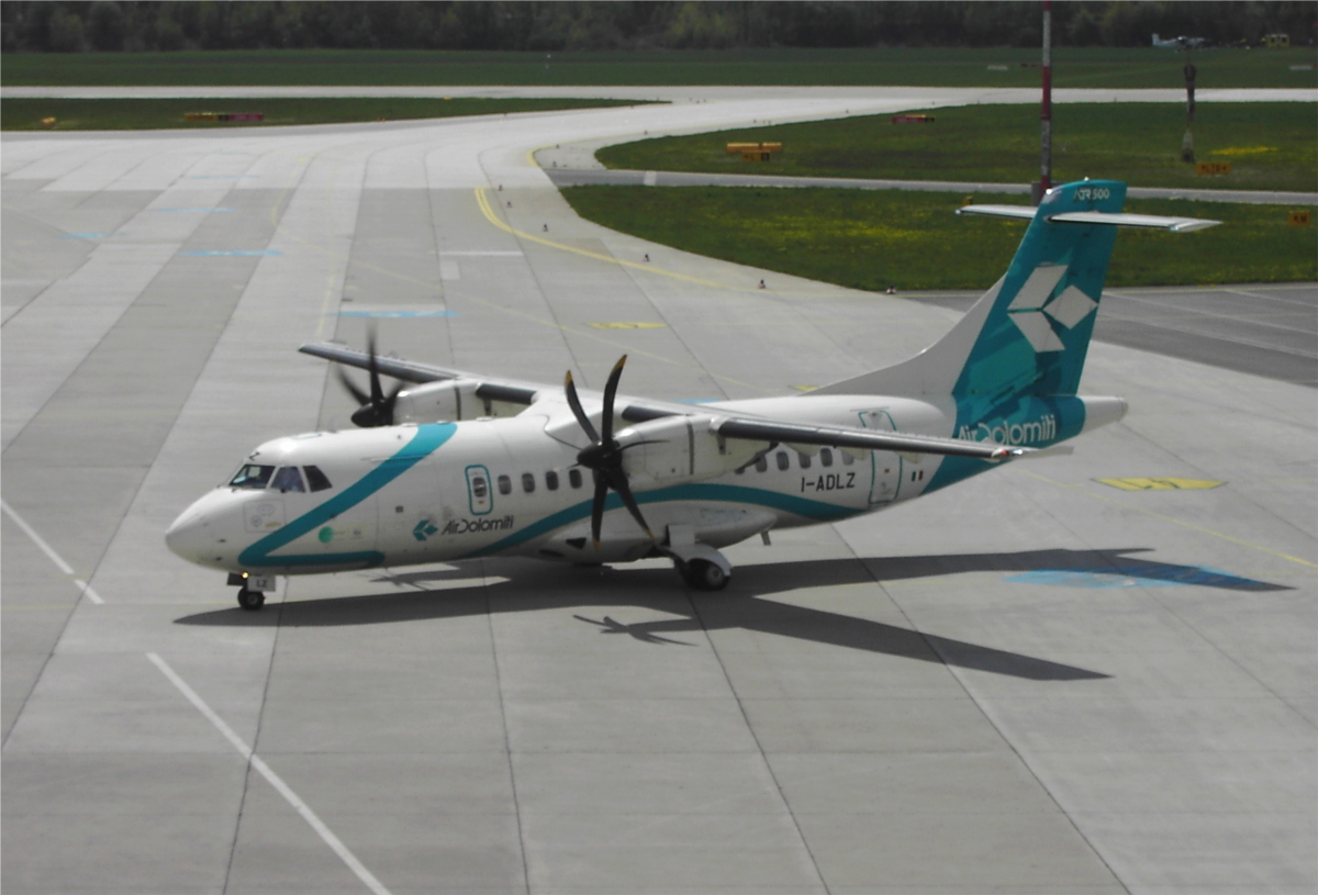 Eine ATR 42-500 der Air Dolomiti in Klagenfurt